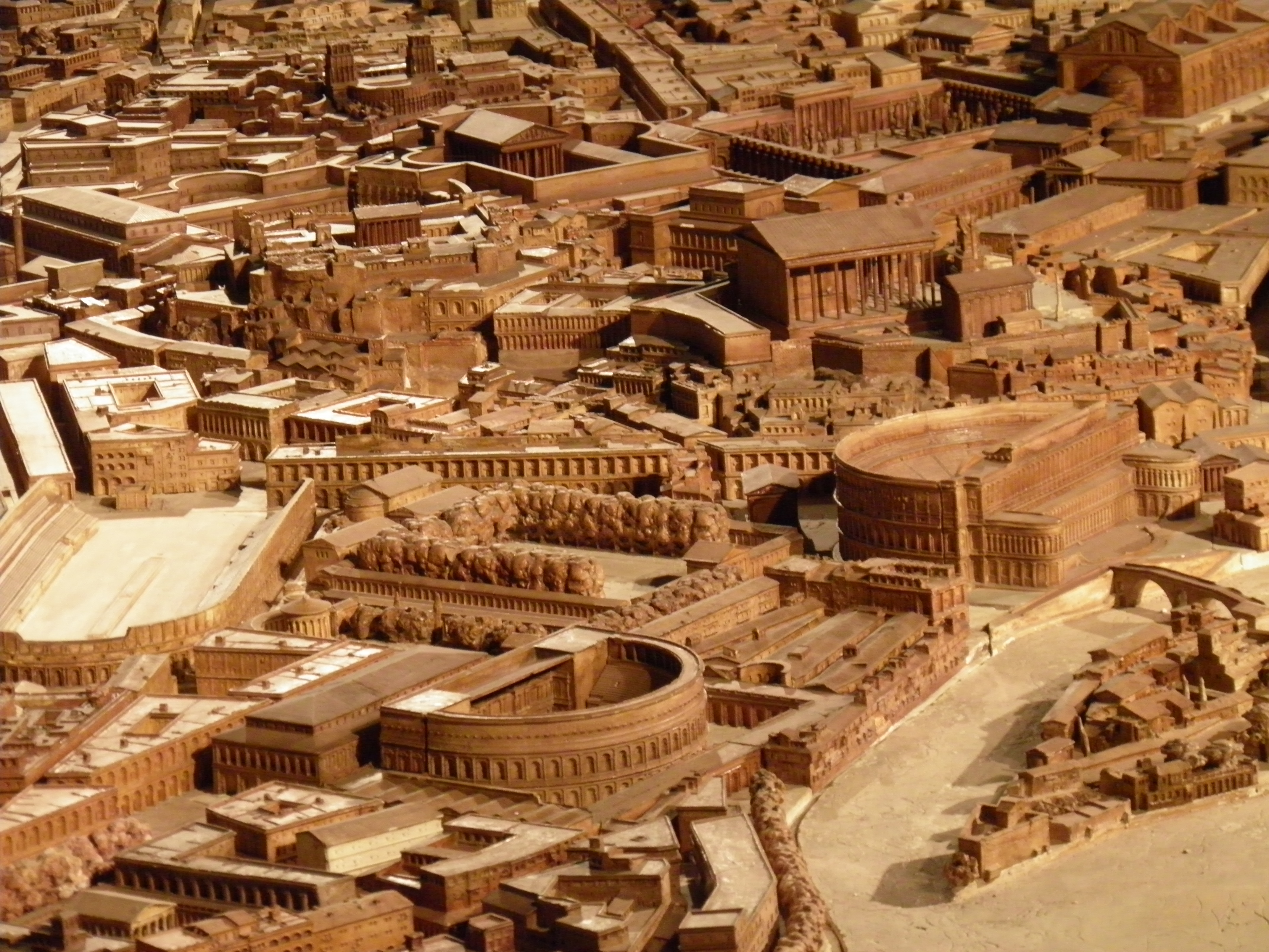 Du cirque de Domitien et du théâtre de Balbus (fausse localisation) à la zone des forums impériaux - plan de Rome de Bigot